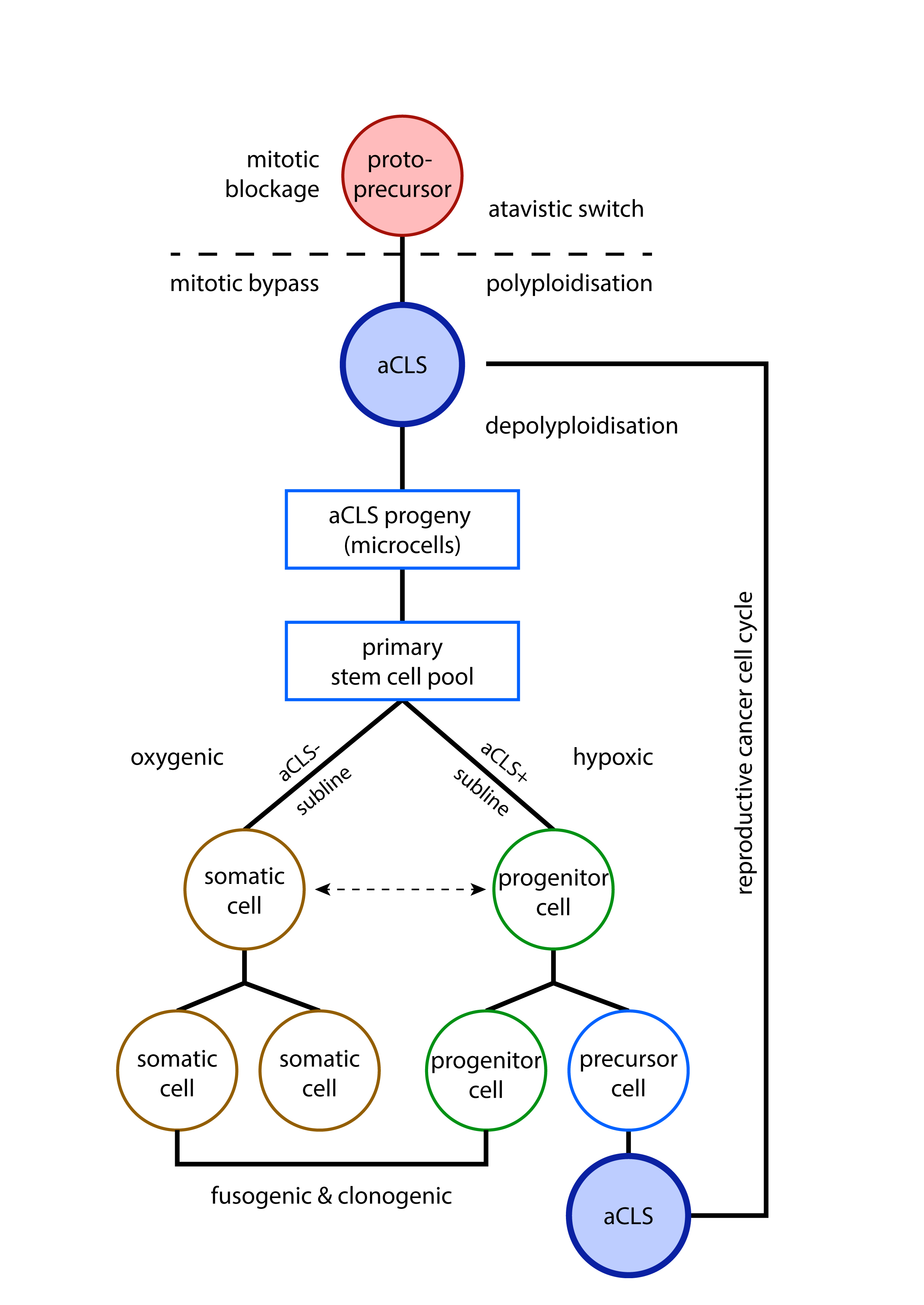 O celula mitotic blocata (protoprecursorul cancerului) reuseste sa produca celule fiice printr-un process atavistic de hiper-poliploidizare, diviziuni nucleare reductive, depoliploidizare si diseminarea microcelulelor fiice, asemanator procesului de inchistare-dechistare al protistelor. Microcelulele fiice produc o linie primara de celule stem, care la randul ei formeaza doua liniii celulare diferite: o sublinie reproductiva, care formeaza noi formatii pseudo-chistice (aCLS+) si o sublinie somatica (aCLS-) care nu diferentiaza chisti. In anumite conditii de mediu, celulele canceroase somatice se pot transforma in cellule CSC secundare (